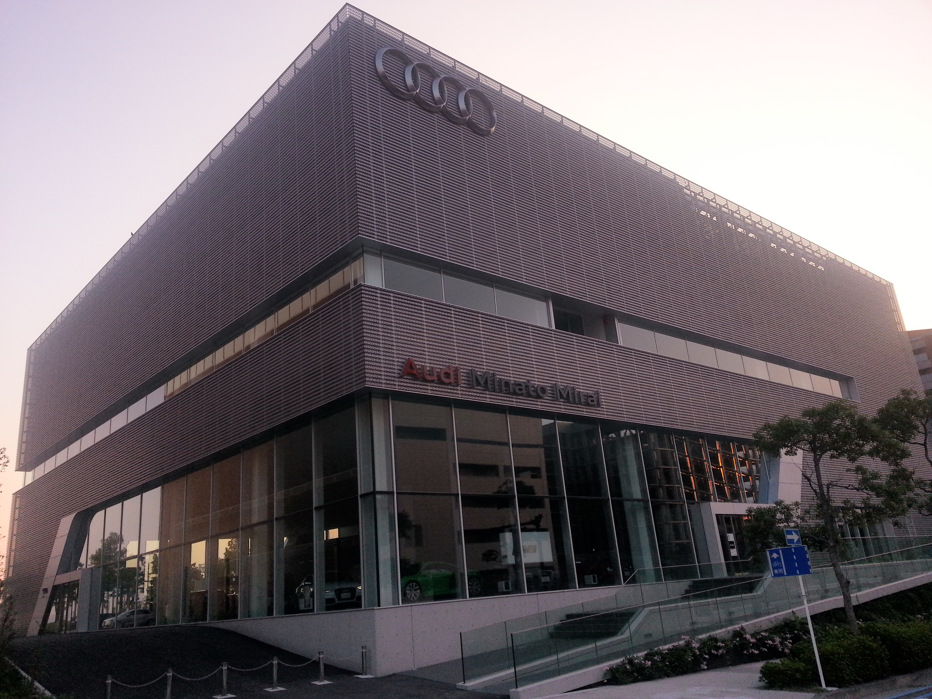 アウディみなとみらいの外観（南側）。